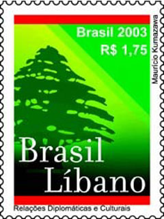 União Brasil e Líbano